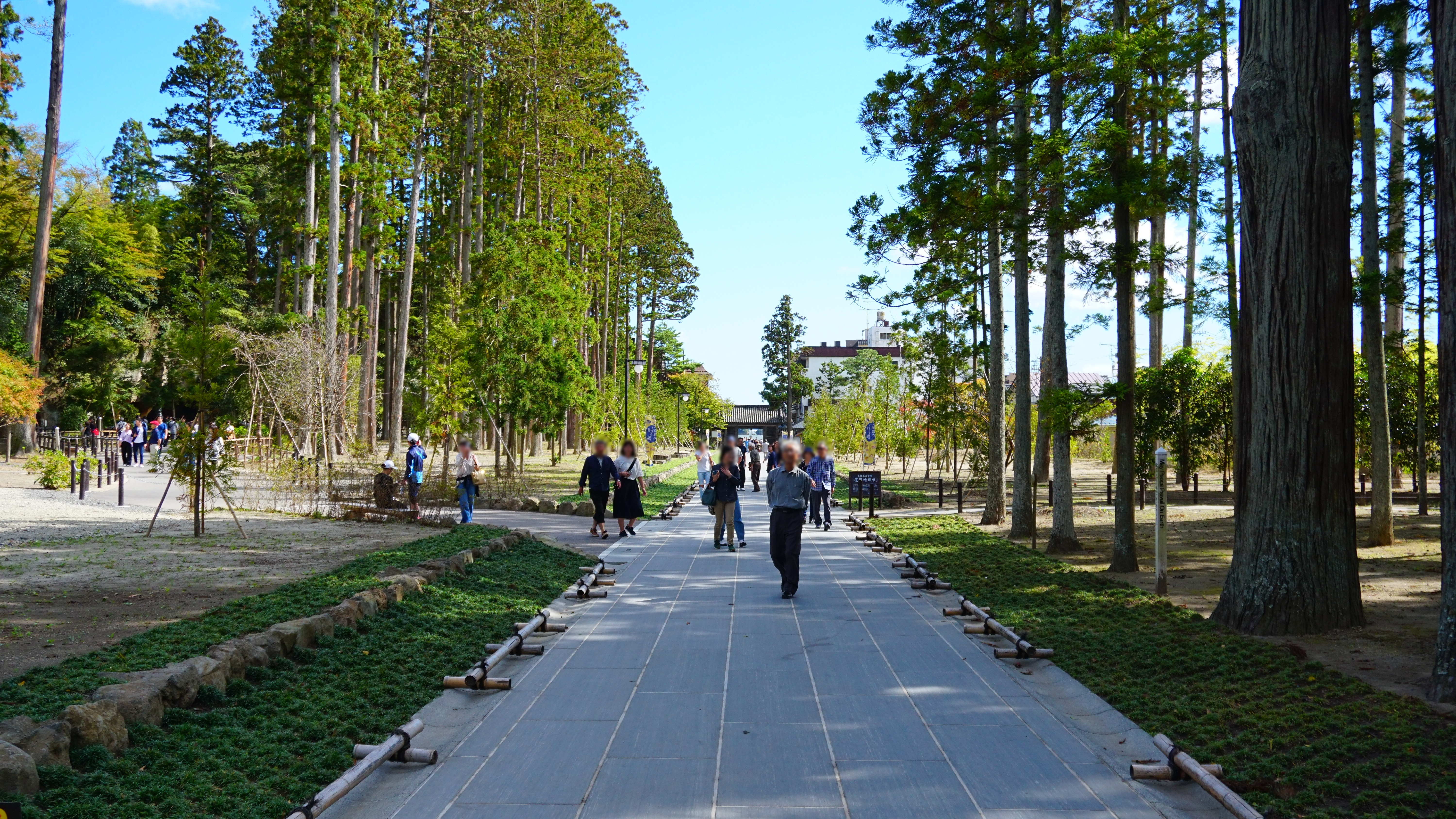 宮城県松島町、瑞巌寺の参道。2011年3月11日の東日本大震災によって発生した津波により杉木立の多くが枯死した。